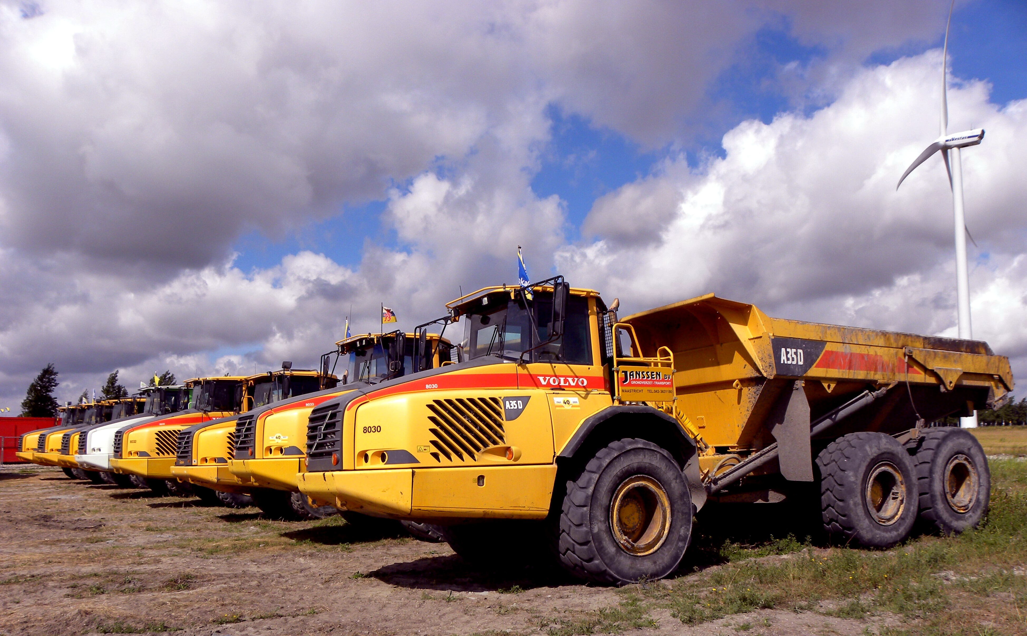 Volvo A 35 D Articulated Haulers line up, ingebruik bij het Vopak werk gebeuren westhaven amsterdam